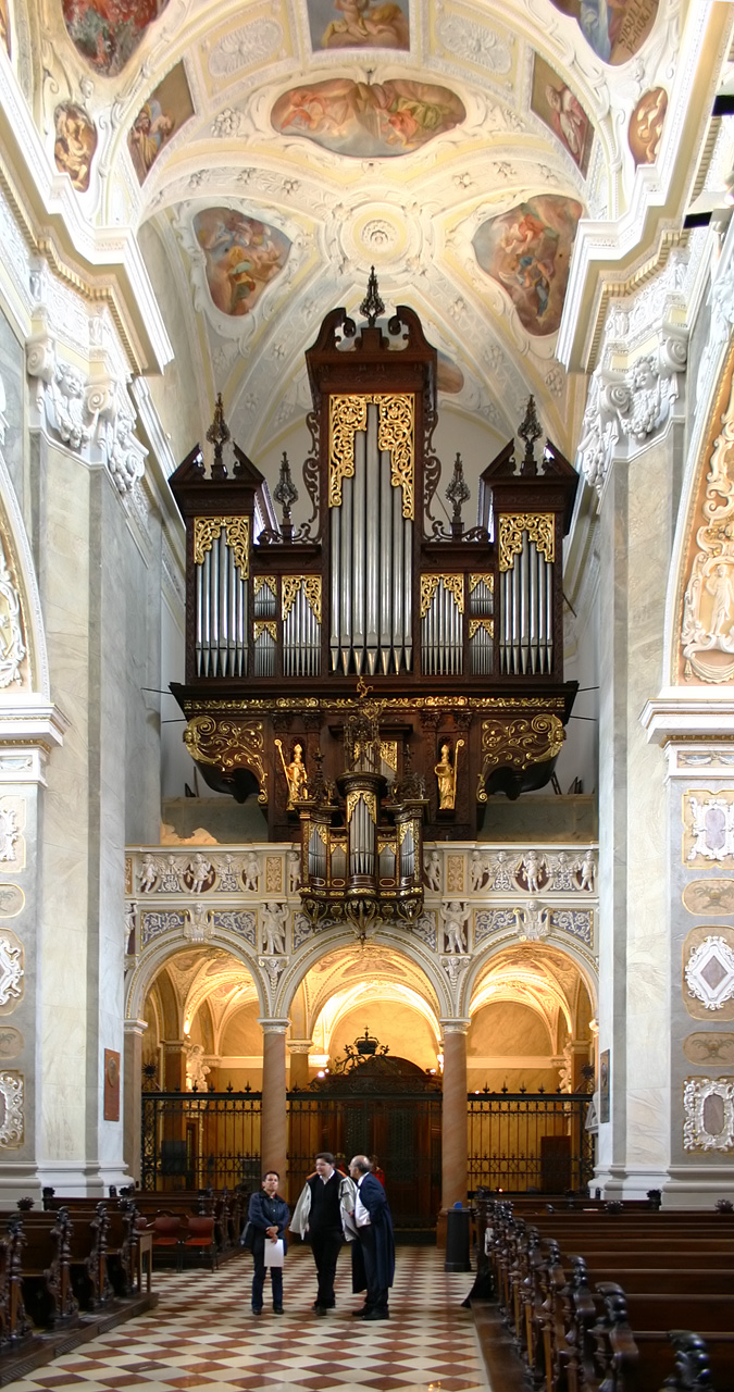 Einblick in die Stiftskirche von Klosterneuburg, Richtung Orgelempore